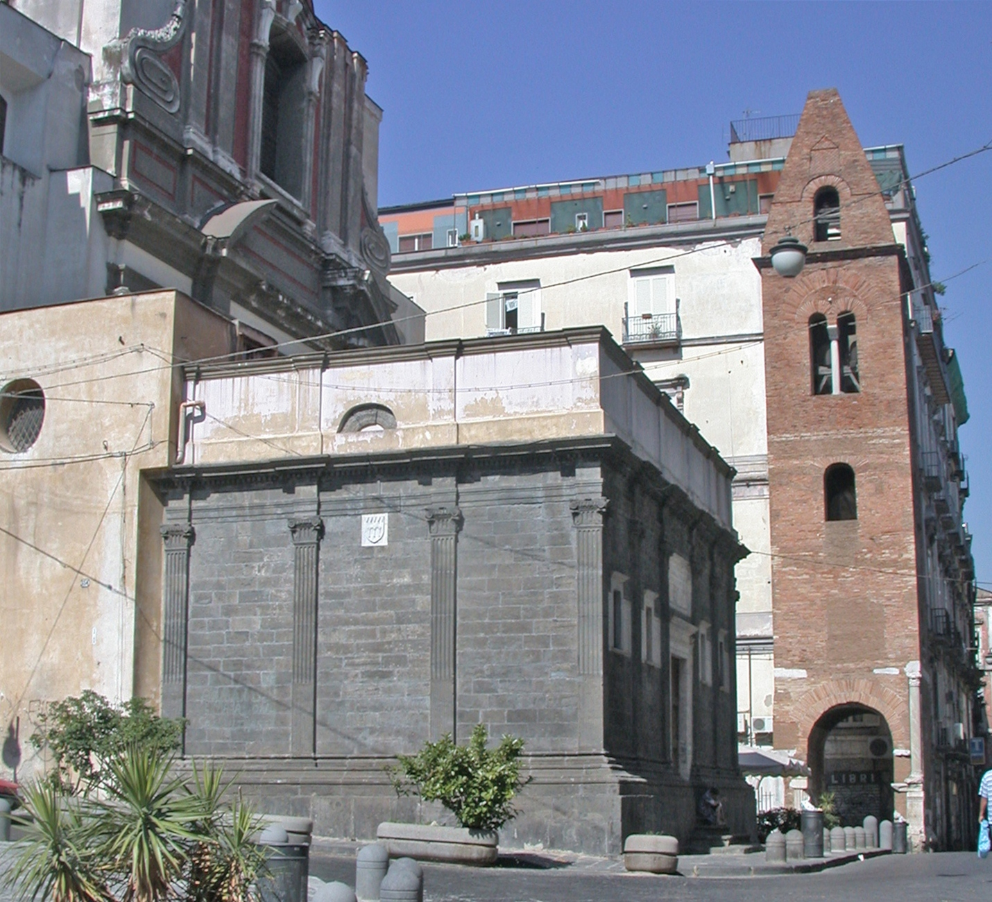 Italia, regione Campania, Napoli, Cappella dei Pontano e campanile di Santa Maria Maggiore.